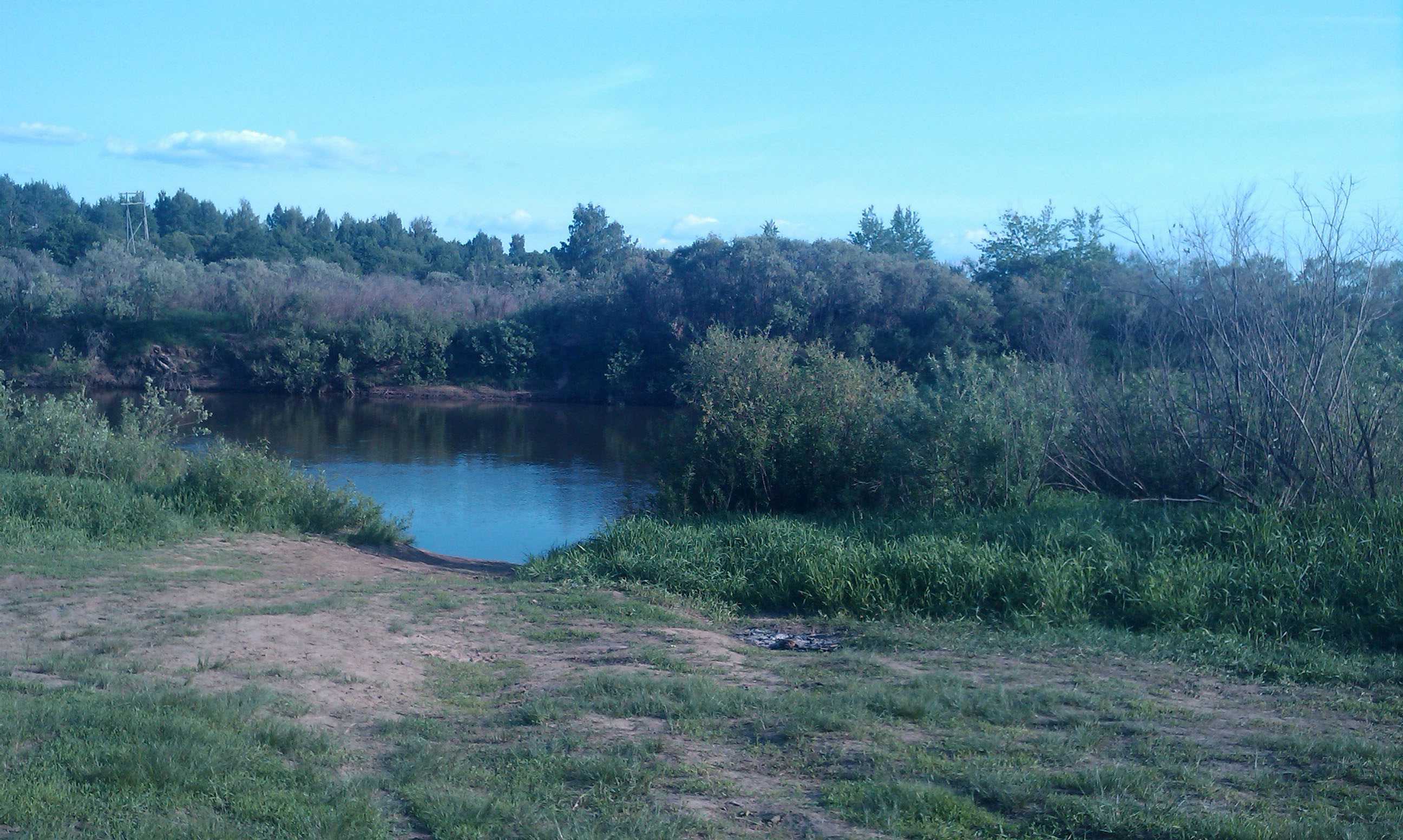 На этом месте на реке Днепр в июле-августе 1941 года проходила Соловьёвская переправа. Фото сделано напротив памятного знака, установленного на переправе.